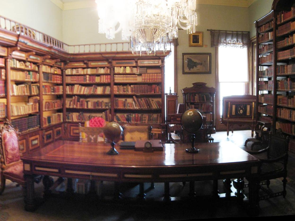 Caliph Abdülmecid Library (Halife Abdülmecid Efendi Kütüphanesi) in Dolmabahçe Palace. (#12 of the tour).